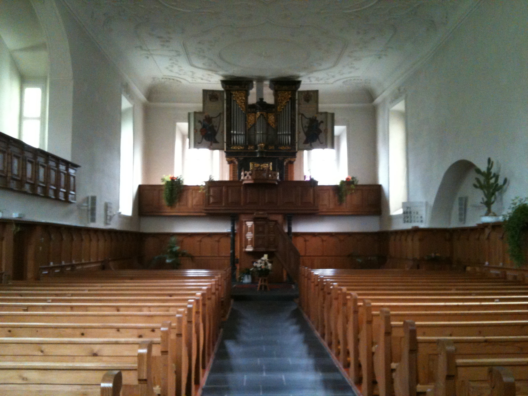 reformierte Kirche Maienfeld (Amanduskirche), Kanton Graubünden